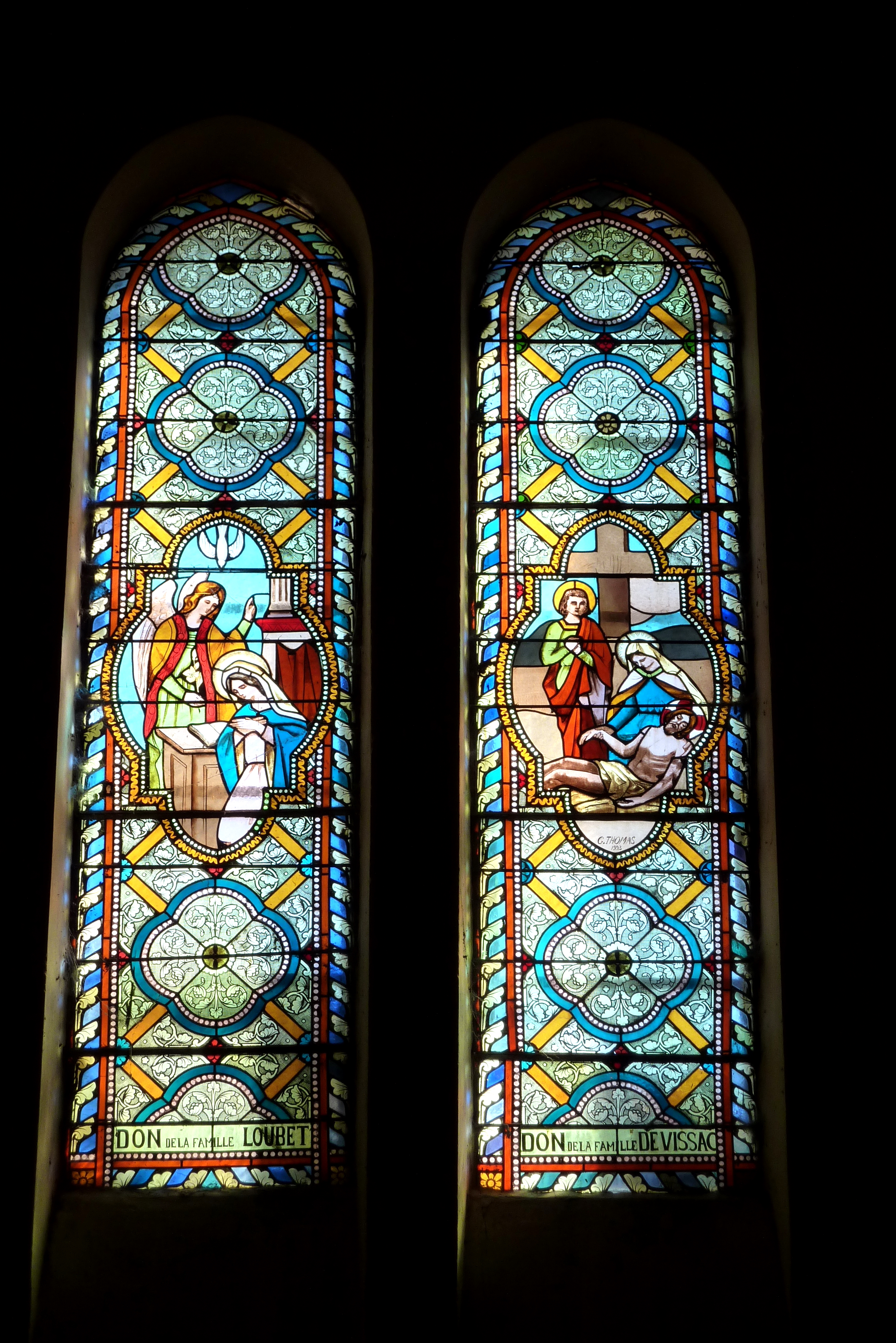 Bleiglasfenster in der Kirche St. Sébastien in La Bégude-de-Mazenc, Darstellung: ?